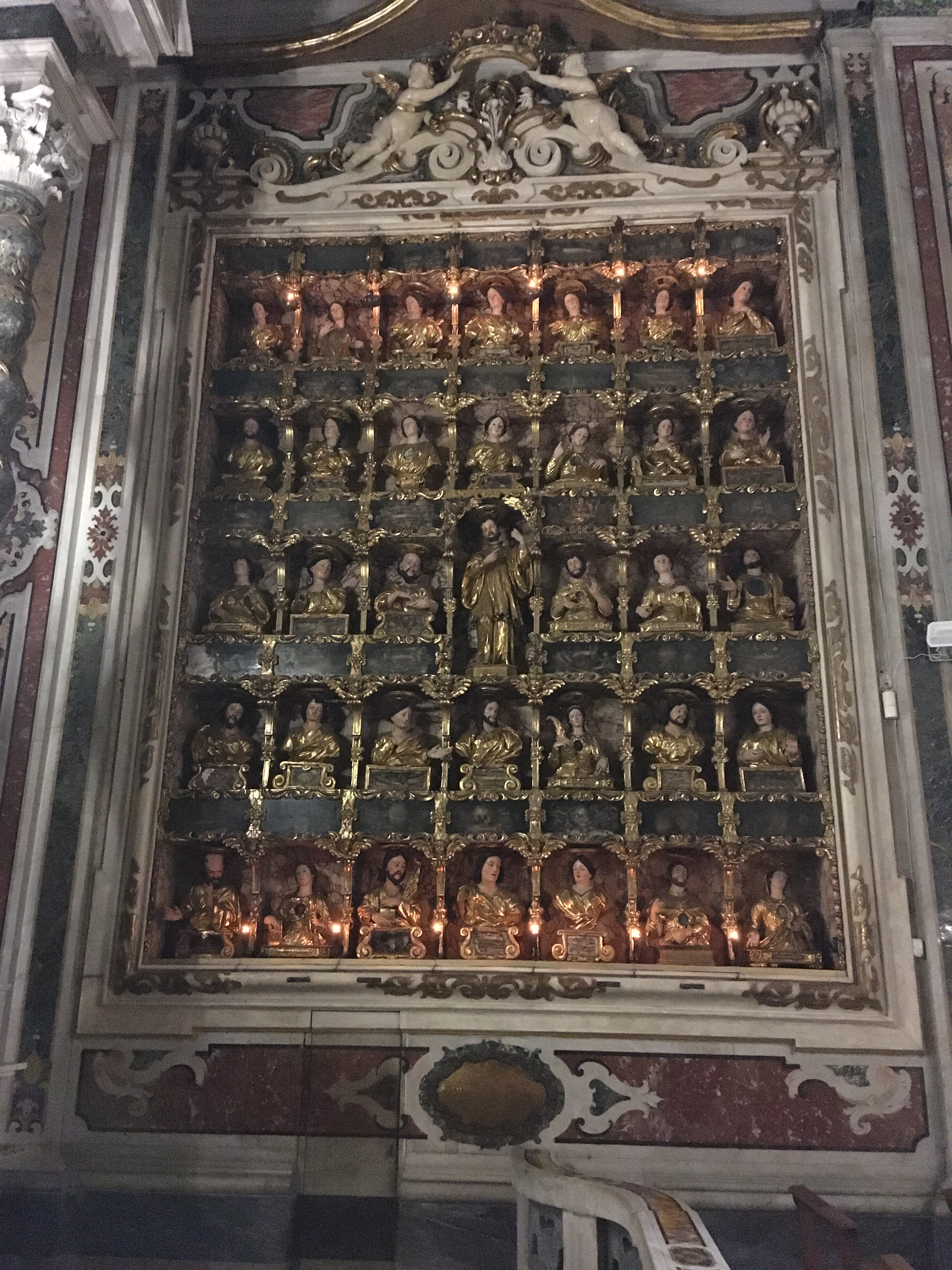 Opera di (Giovan Domenico Vinaccia) Lipsanoteca " Reliquiario"